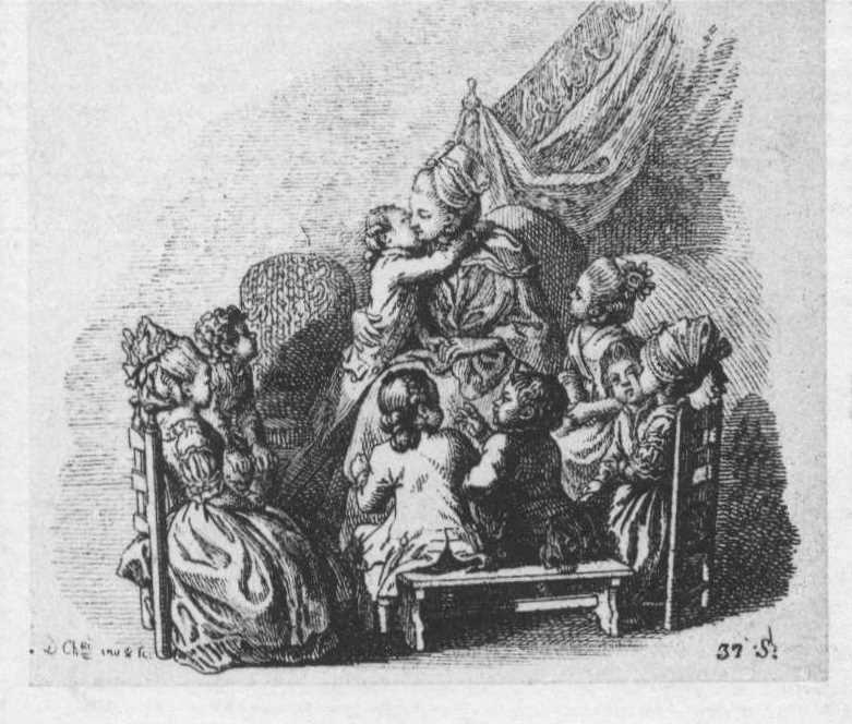 Titelvignette zu Schummel's Kinderspielen. (Beschreibung lt. Quelle)